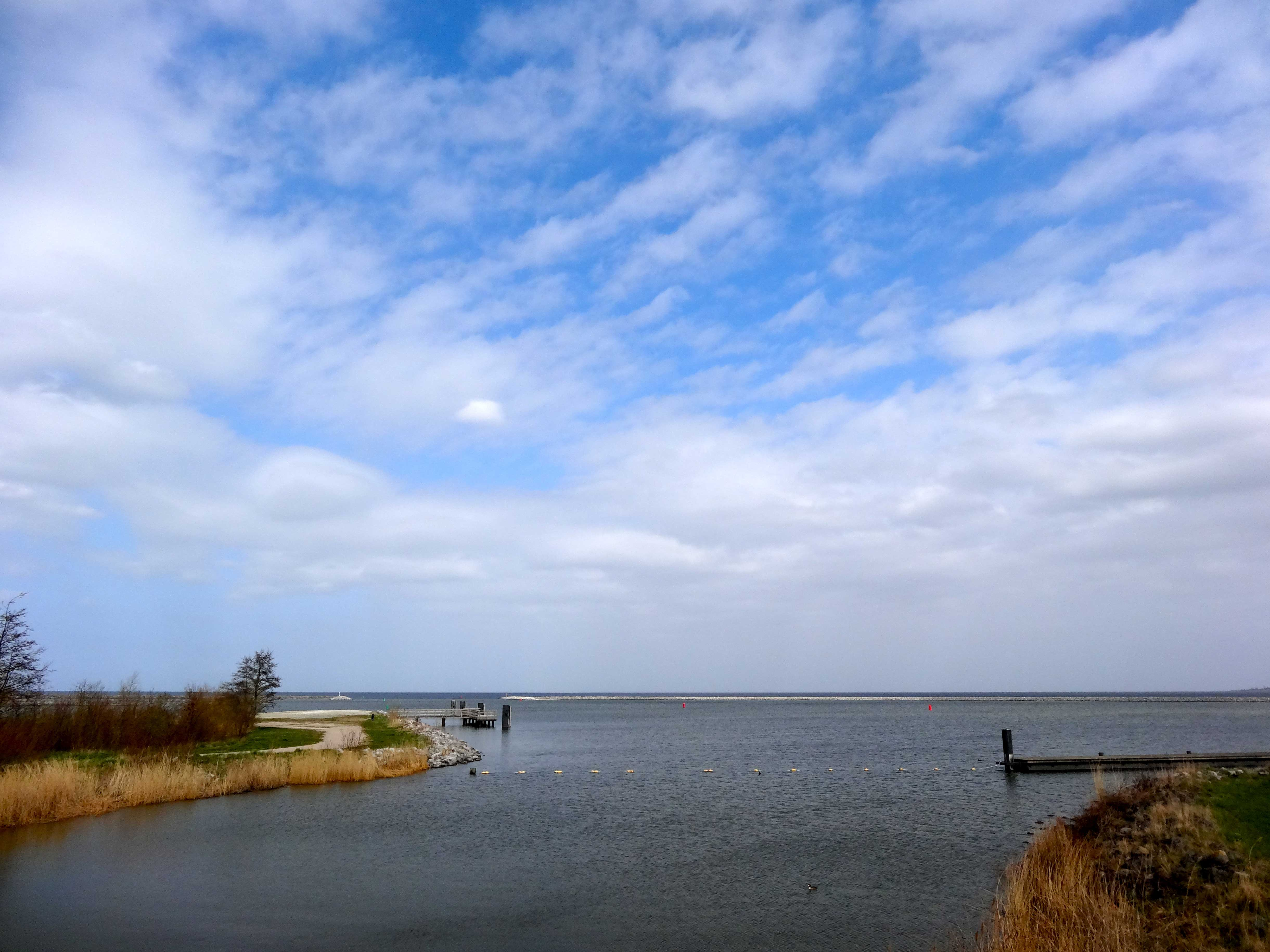 IJsselmeer gezien vanaf de Vooroever nabij Medemblik